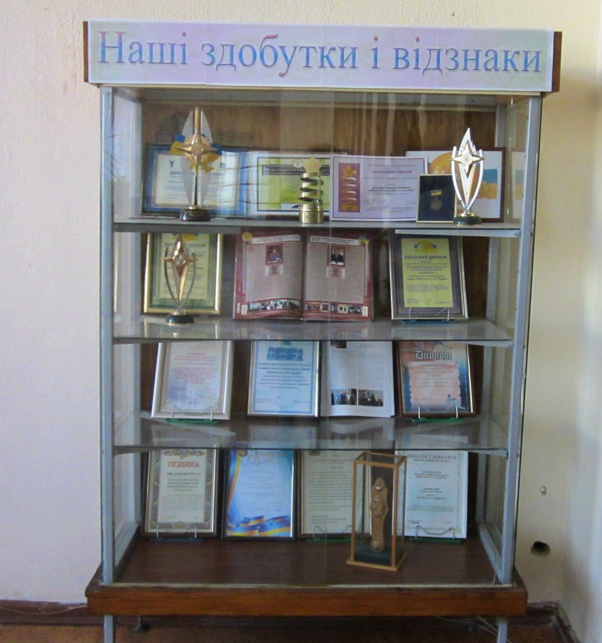 Награды коллективу библиотеки